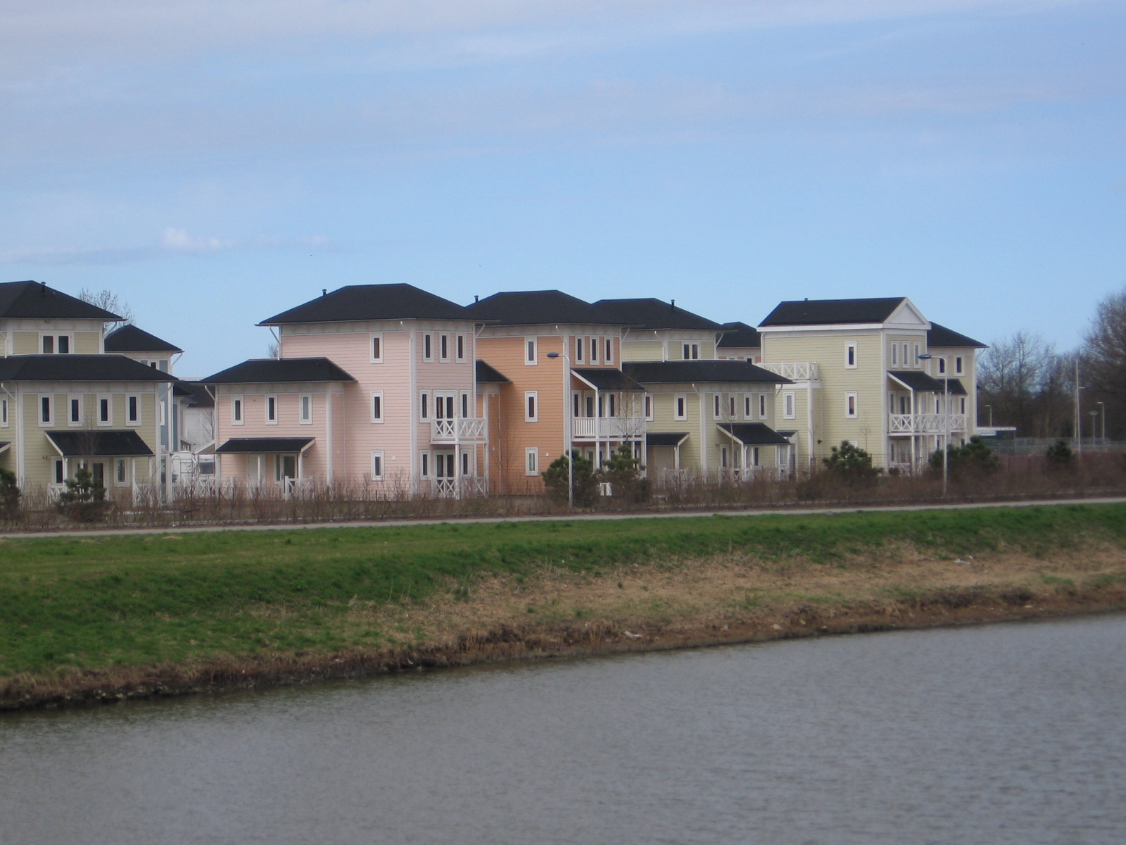 Hellevoetsluis